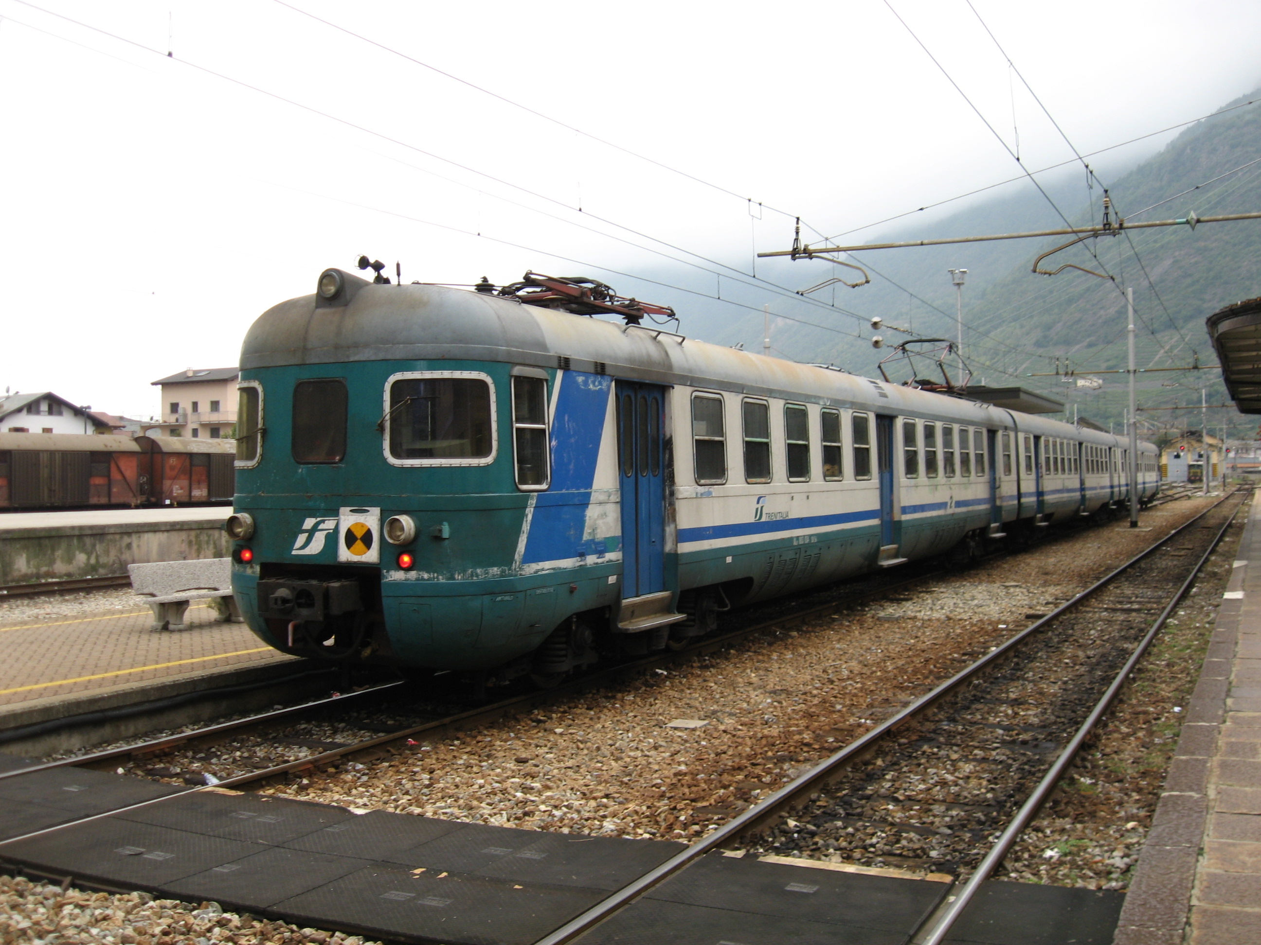 Tirano FS station